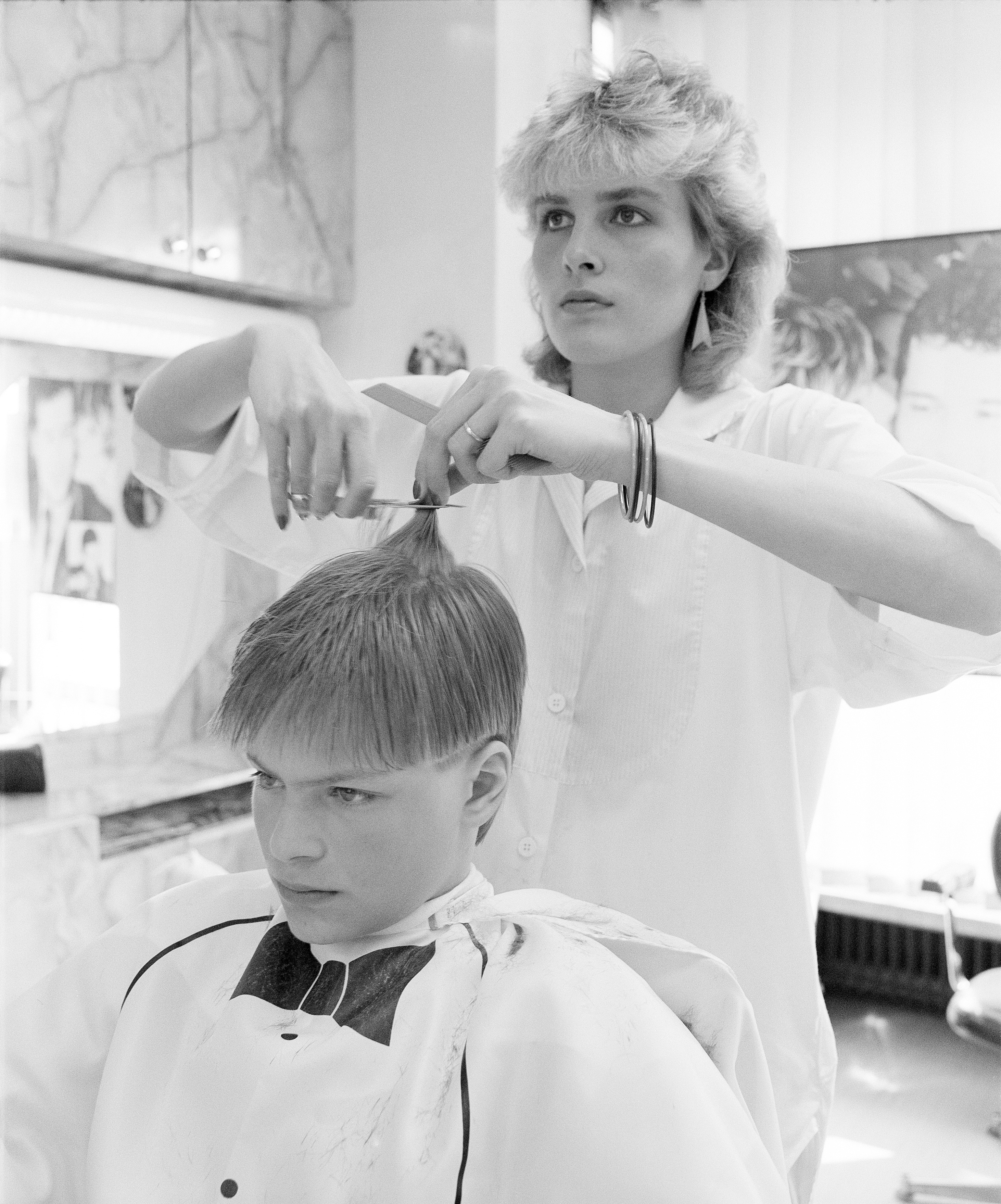 Parturi-kampaamo Tuulitukka ky, Vihdintie 2. Parturi-kampaajan on tärkeää nähdä, mikä hiusmalli asiakkaan kasvonmuotoihin sopii.